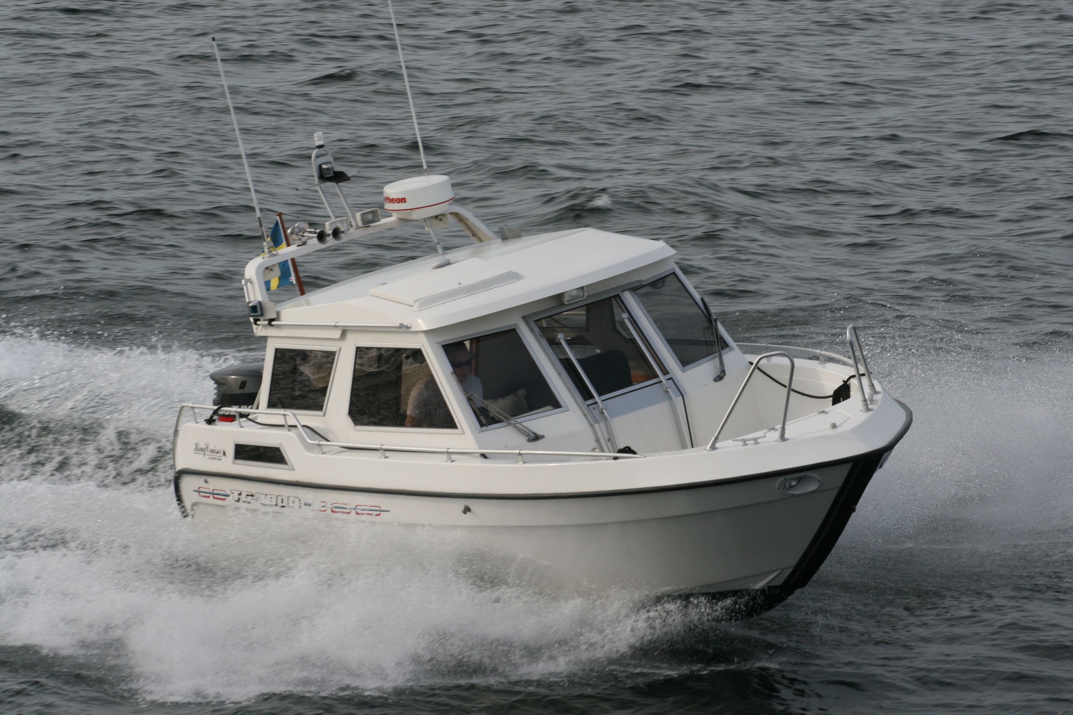 TG 7000 KingCruiser på Furusundsfjärden, Norrtälje 22 augusti 2010